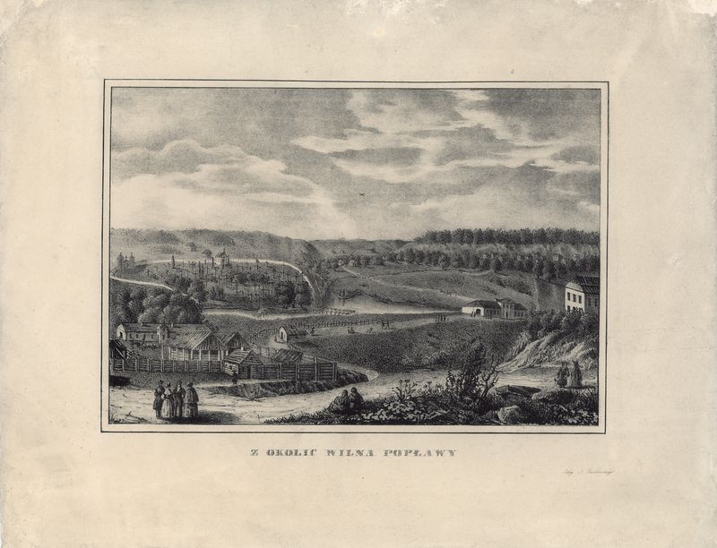 Беларуская (тарашкевіца): Вільня (Vilnia), прадмесьце Паплавы (Papłavy)